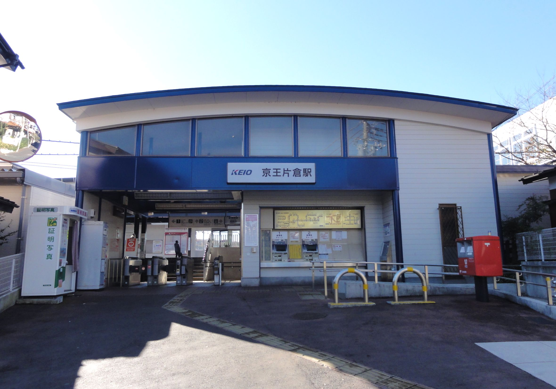 京王片倉駅